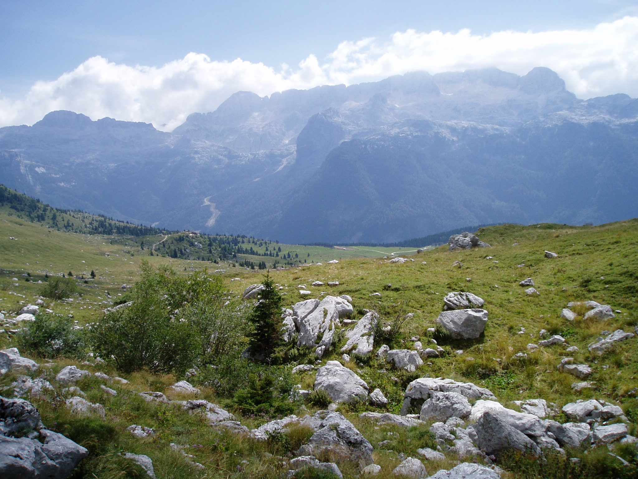 "Monte Canin from Forca dei Disteis"